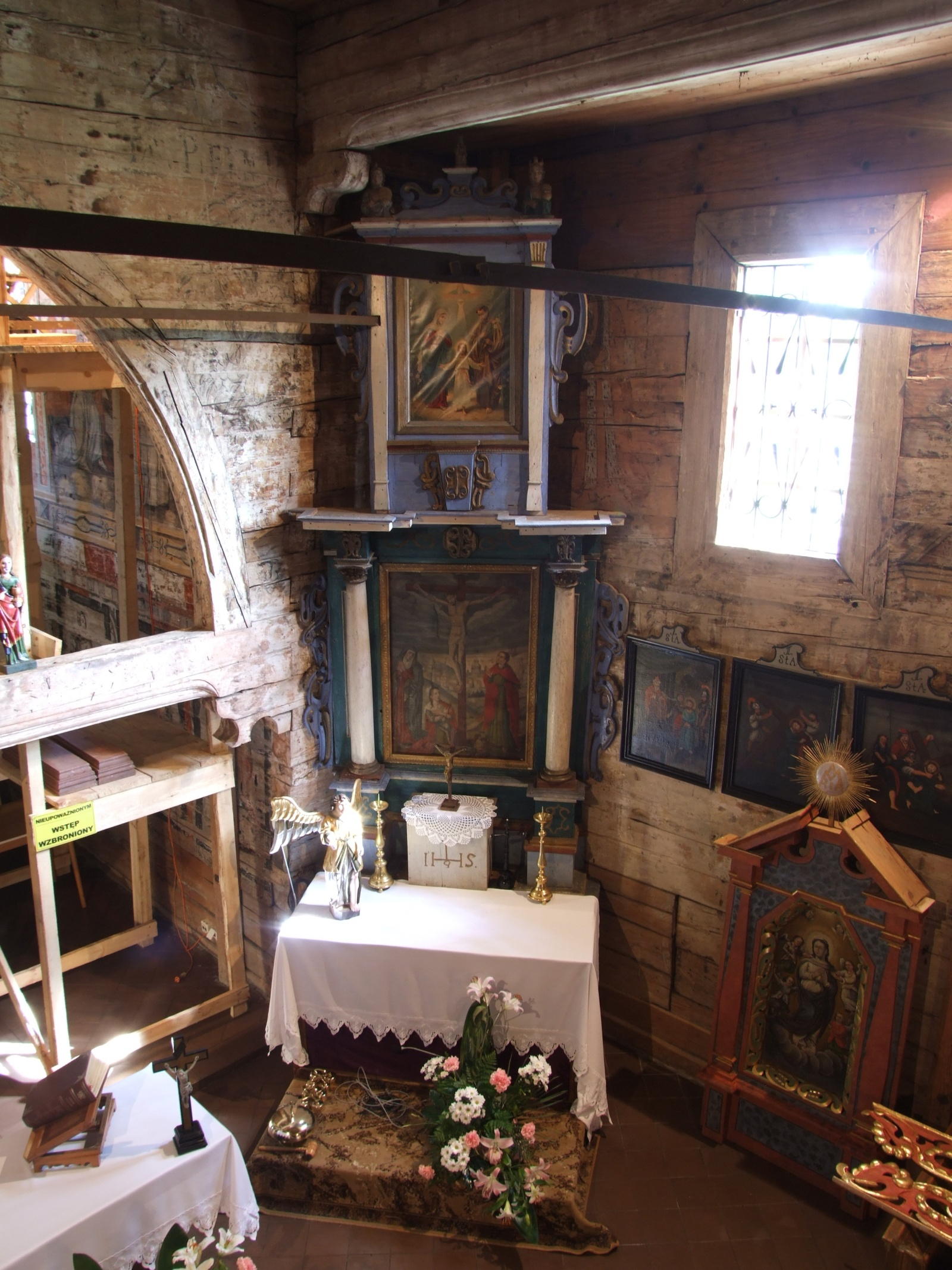 Muzeum parafialne w starym kościele w Iwkowej